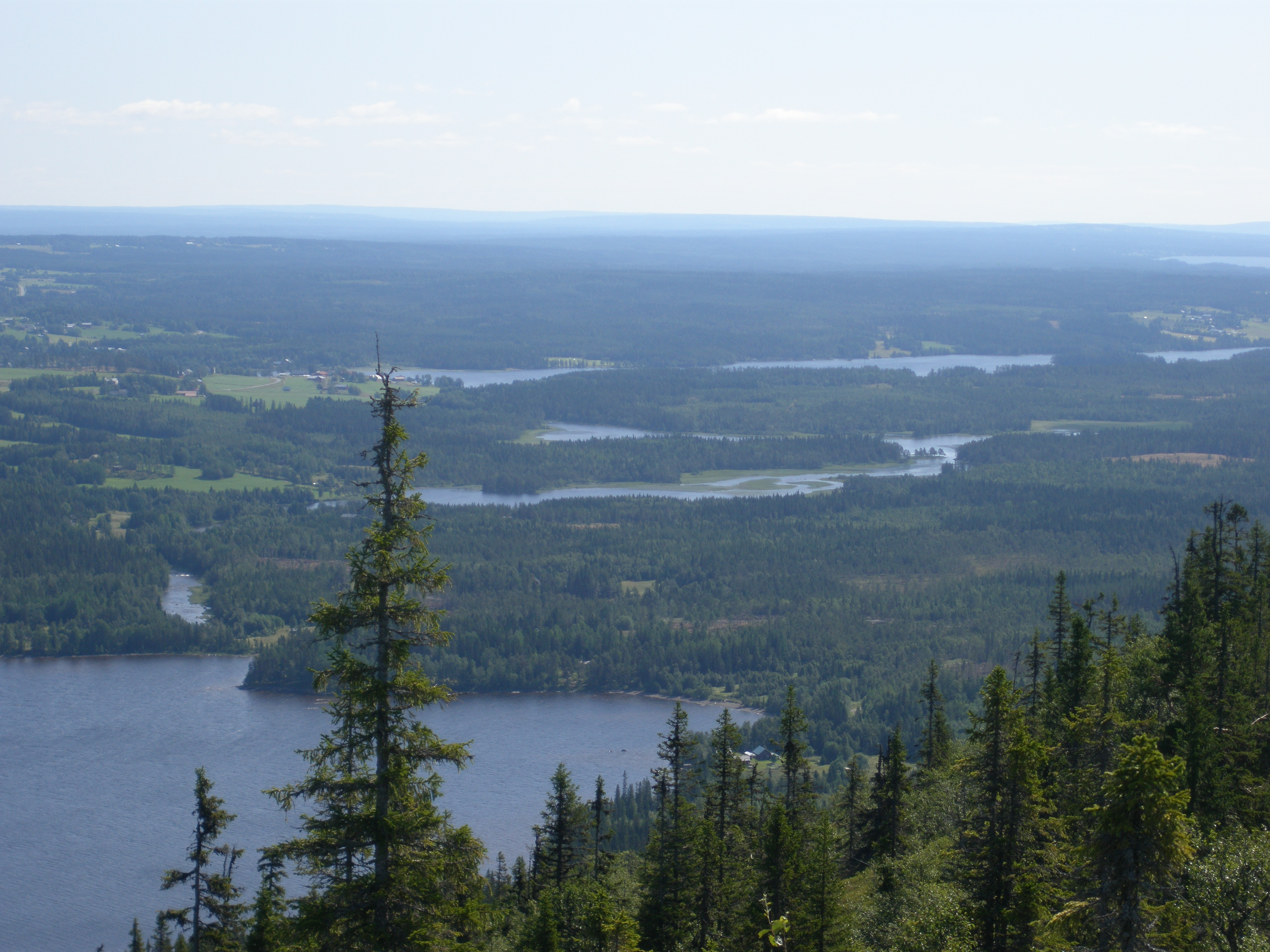 Utsikt från Hällberget mot Krikensjöarna i Offerdals socken, Krokoms kommun, Jämtland, Sverige.